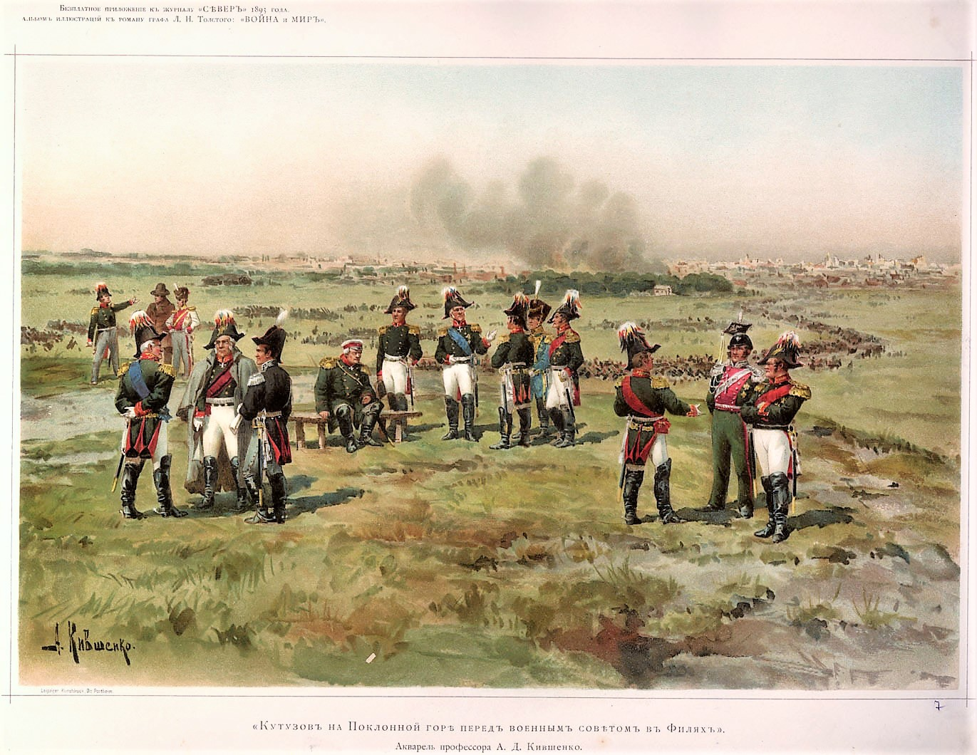 Это акварель русского художника Алексея Кившенко:«Кутузов на Поклонной горе перед военным советом в Филях». Иллюстрация к роману Льва Толстого «Война и мир».